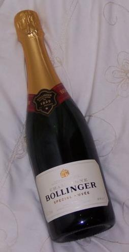 Bouteille de champagne Bollinger